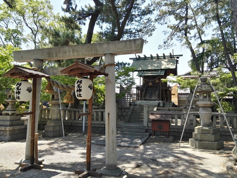 Tanao jinja with torii